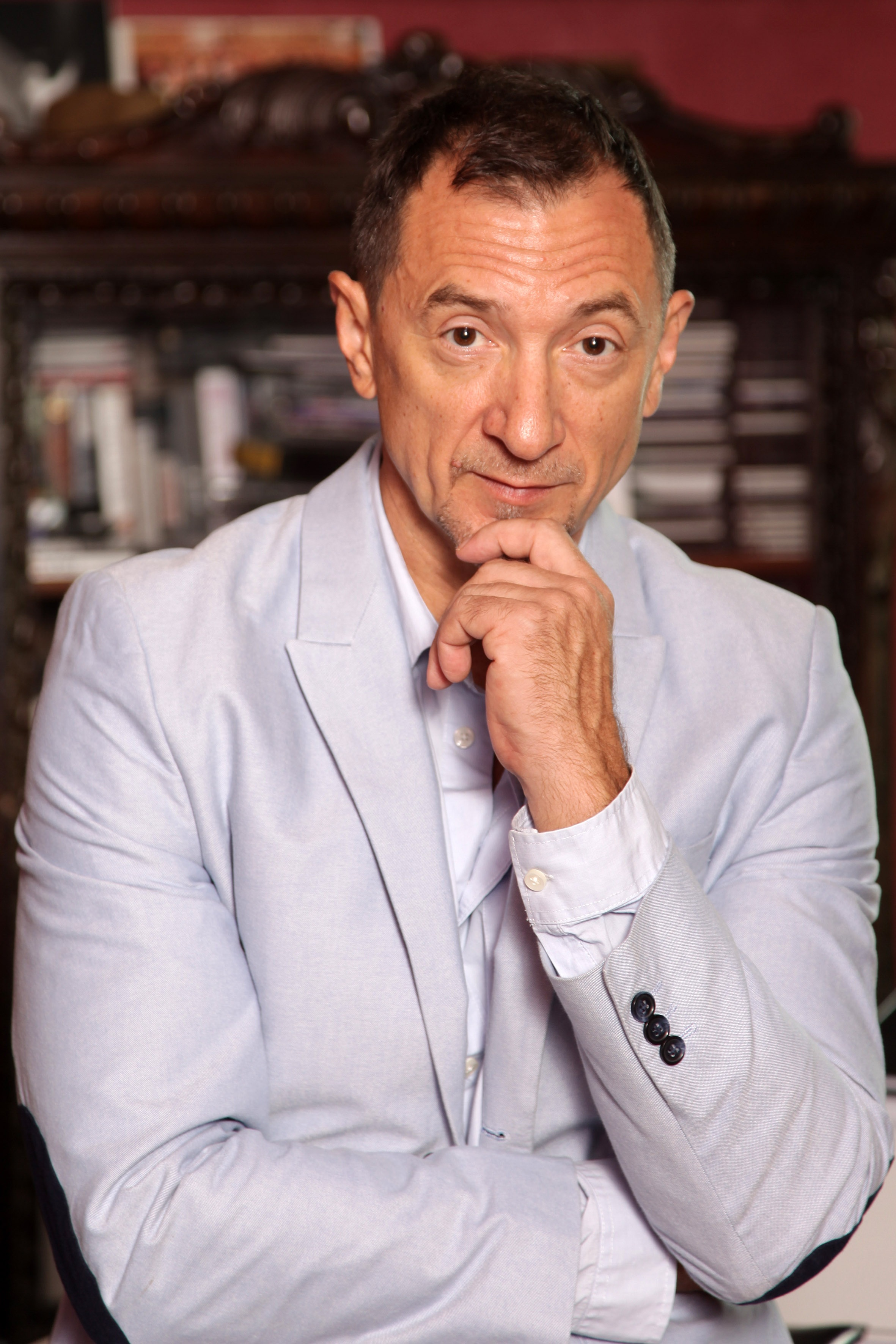 Az ExperiDance koreográfusa: Román Sándor